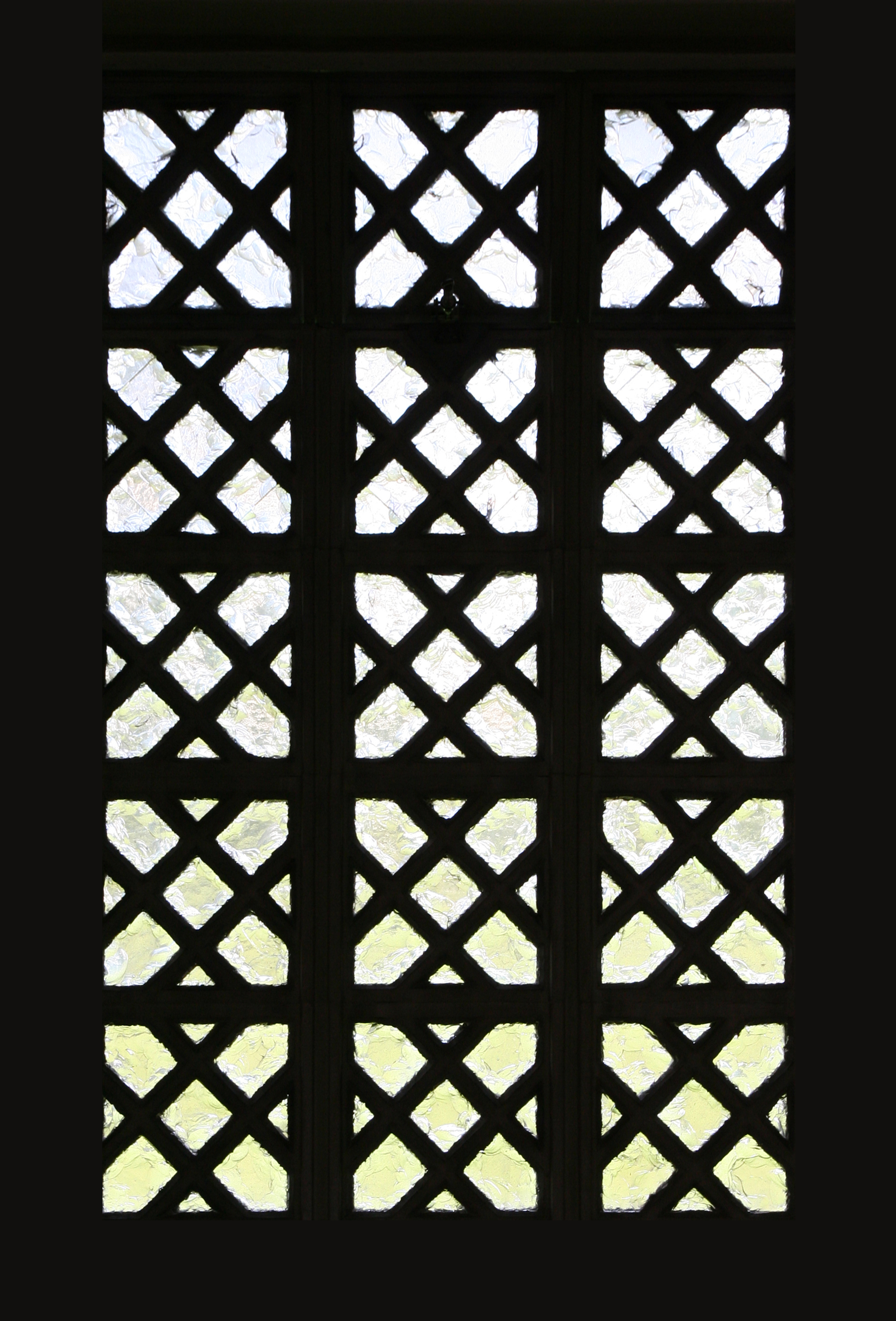 Römisch-katholische Kapelle St. Anna Wädenswil, Fenster mit Betongotik